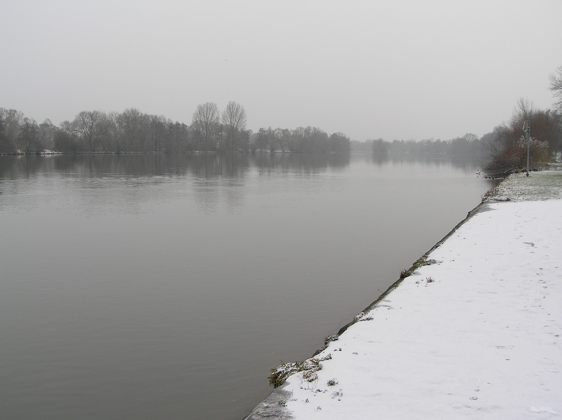 Der Main in Niedernberg